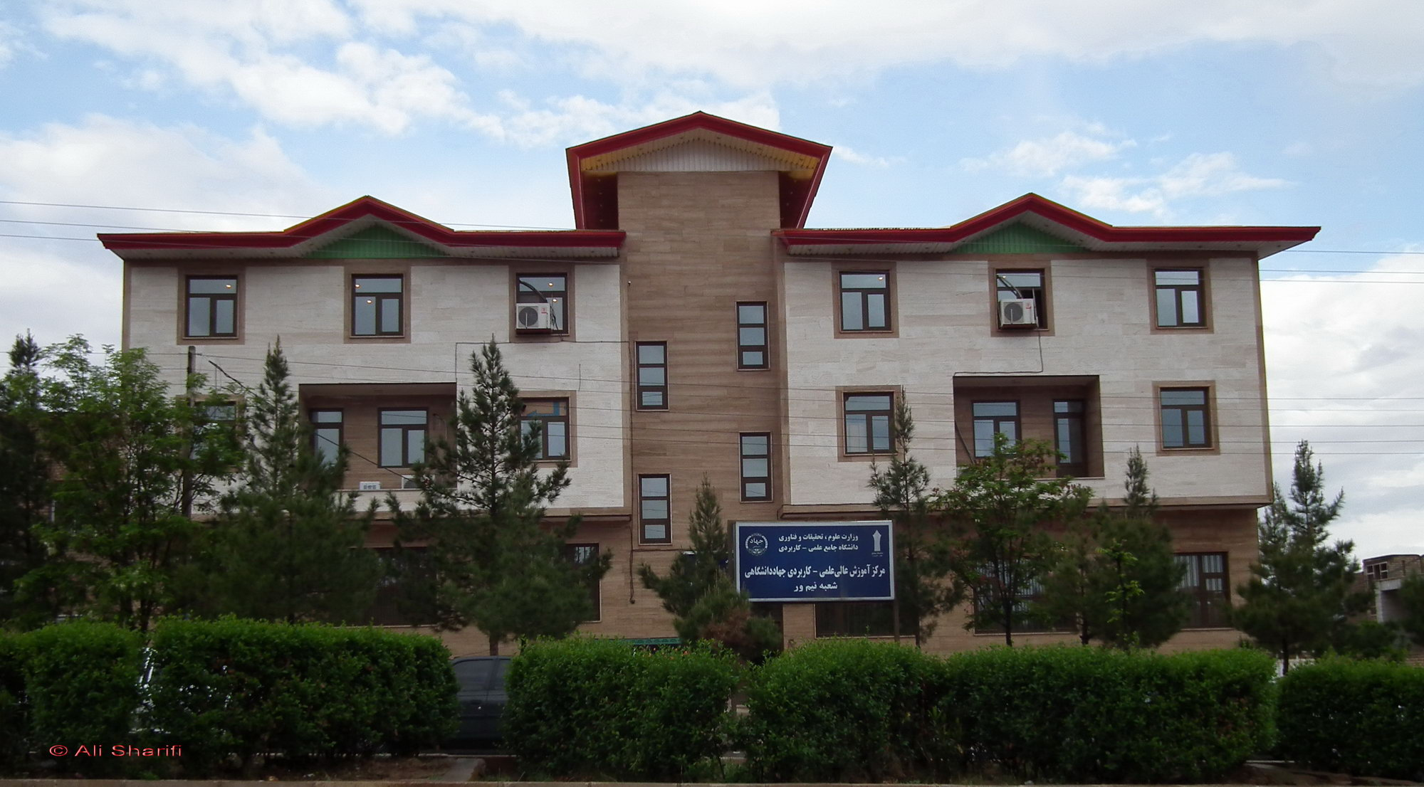 دانشگاه جامع علمی کاربردی نیمور Nimvar 02